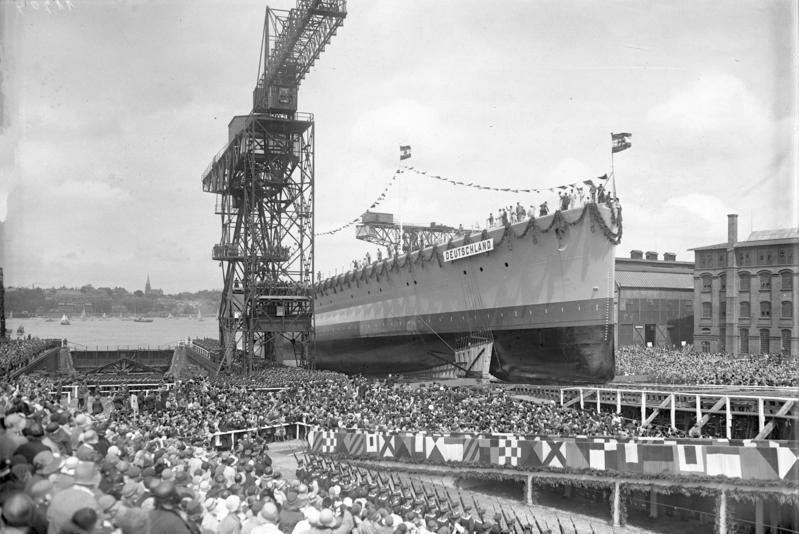 Der Panzerkreuzer "A" wurde vom Reichspräsidenten von Hindenburg auf den Namen "Deutschland" auf der Germania-Werft in Kiel getauft. Der Panzerkreuzer Deutschland während des Stapellaufes, umjubelt von einer vieltausendköpfigen Menschenmenge.